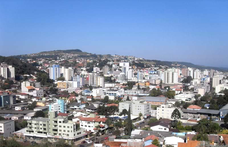 Vista de Concórdia